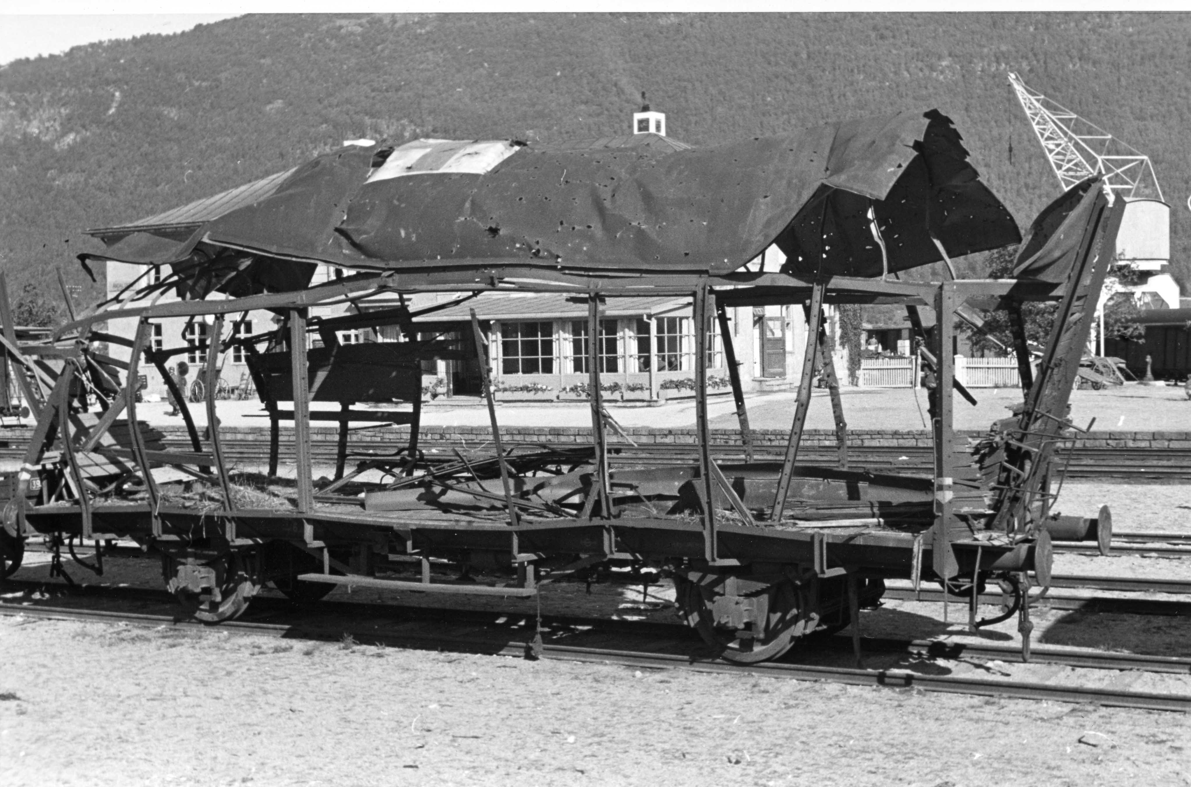 Beskrivelse: Den tyske invasjonen innebar at 24 byer og tettsteder i Norge ble bombet våren 1940. Det gjaldt bl.a. Molde, Kristiansund, Steinkjer og Namsos. Riksarkivet har mottatt 64 fotografier (papirpositiver 9 x 12 cm) som ifølge påskrift på konvolutten skal være tatt i juli 1940 i Kristiansund, Steinkjer og Levanger. Fotografiene har tilhørt ingeniør Hallvard Løken (1908-1995). Han var en dyktig amatørfotograf og kan meget vel ha tatt bildene selv. Takket være god hjelp har vi fått stedsbestemt mange av motivene, men ikke alle, og Riksarkivet mottar gjerne nærmere opplysninger. Arkivreferanse: PA-1667U2_049 The bombing of railway station The German invasion resulted in 24 towns and villages being bombed in the spring of 1940. This included Molde, Kristiansund, Steinkjer and Namsos. The National Archives of Norway has received 64 photographs (paper positives 9 x 12 cm) that according to information on the envelope are taken in July 1940 in Kristiansund, Steinkjer and Levanger. The photos have belonged to engineer Hallvard Løken (1908-1995). He was a good amateur photographer and might very well have taken the photos himself. Thanks to help from others, we have been able to pinpoint many of the locations, but not all of them, and the National Archives of Norway is very happy to receive further information.